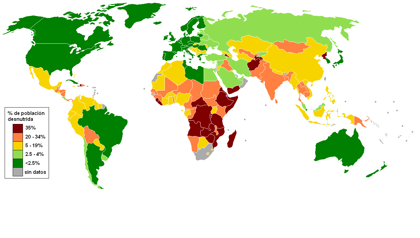 Mapa del mundo indicando los niveles de desnutrición de cada país. Fuentes: United Nations World Food Programme's interactive "hunger map": FAO: The State of Food Insecurity in the World 2006: Cuando dichas fuentes presentan datos contradictorios, se le da prioridad a FAO por ser la más actualizada.